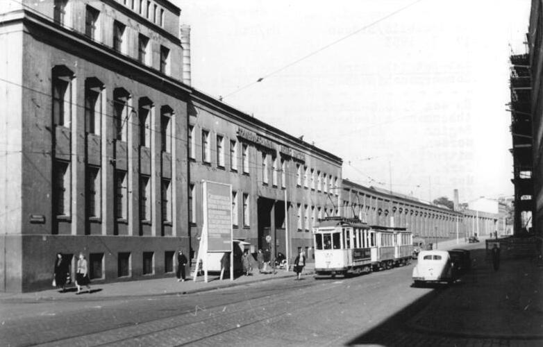 Magdeburg, SAG Schwermaschinenbau Zentralbild Biscan 17.9.1953 SAG-Betriebe werden volkseigen Schwermaschinenbau "Georgij Dimitroff" Zu den 33 SAG-Betrieben, die im Sinne des Moskauer Abkommens zwischen der Sowjtunion und der DDR mit Beginn des Jahres 1954 in deutsche Hand übergeben werden, gehört der Schwermaschinenbau "Georgij Dimitroff" in Magdeburg, das ehemalige Otto-Gruson-Werk. Als einer der grössten Schwermaschinenbetriebe der DDR erzeugt das Dimitroff-Werk vor allem Getriebe für höchste Leistung und Beanspruchung, für Walzerke u.ä.. Zu dem Maschinenpark des Werkes gehören Spezialmaschinen, die in der DDR einmalig sind und die Herstellung von Zahnrädern von 4 und 5 Metern Durchmesser ermöglichen. UBz: Strassenfront der SAG Schwermaschinenbau "Georgij Dimitroff" in Magdeburg